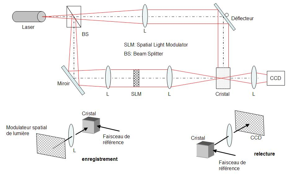 Schéma de principe pour l'enregistrement et la lecture d'une mémoire holographique